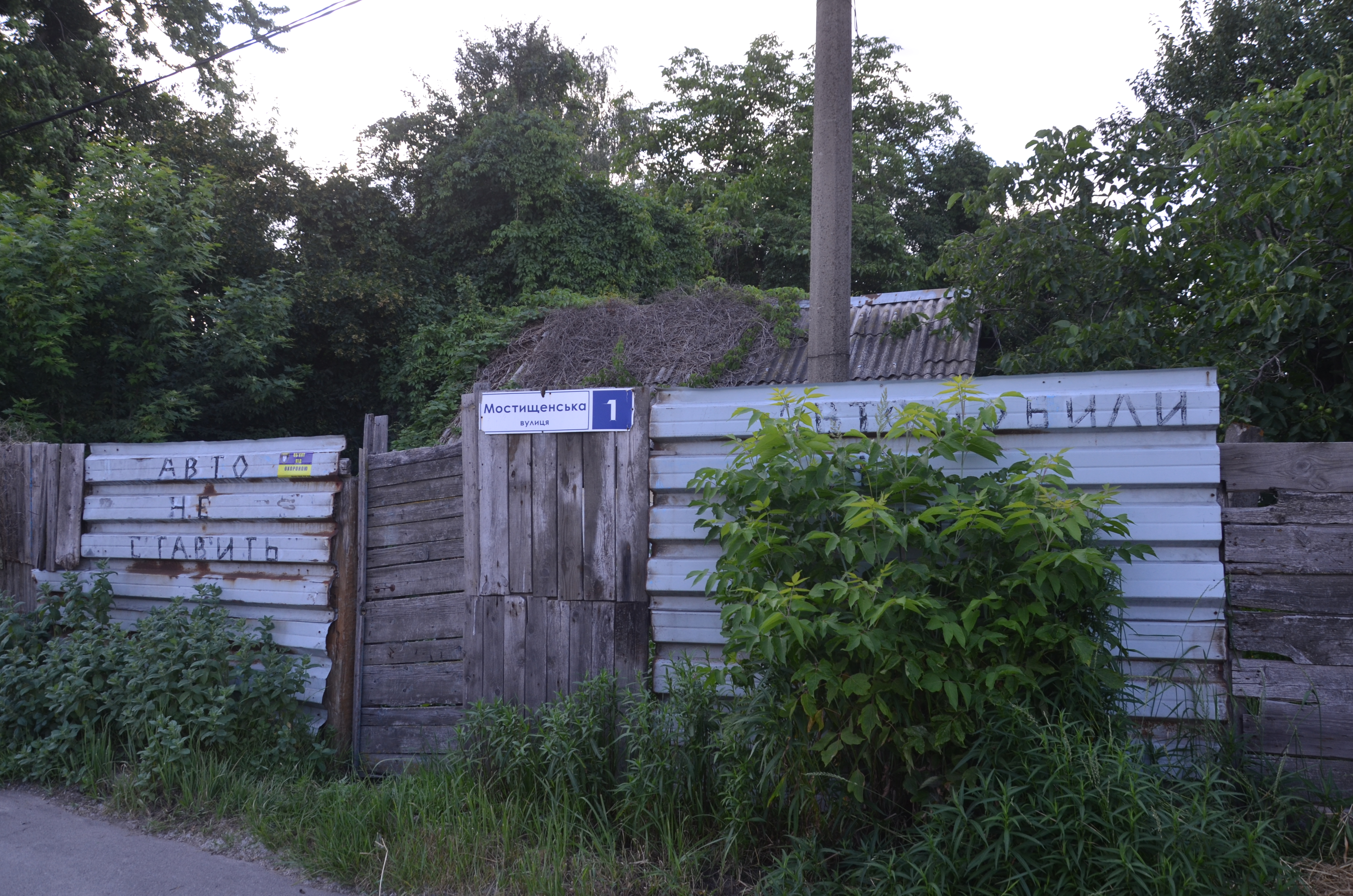 Вулиця Мостищанська, Київ